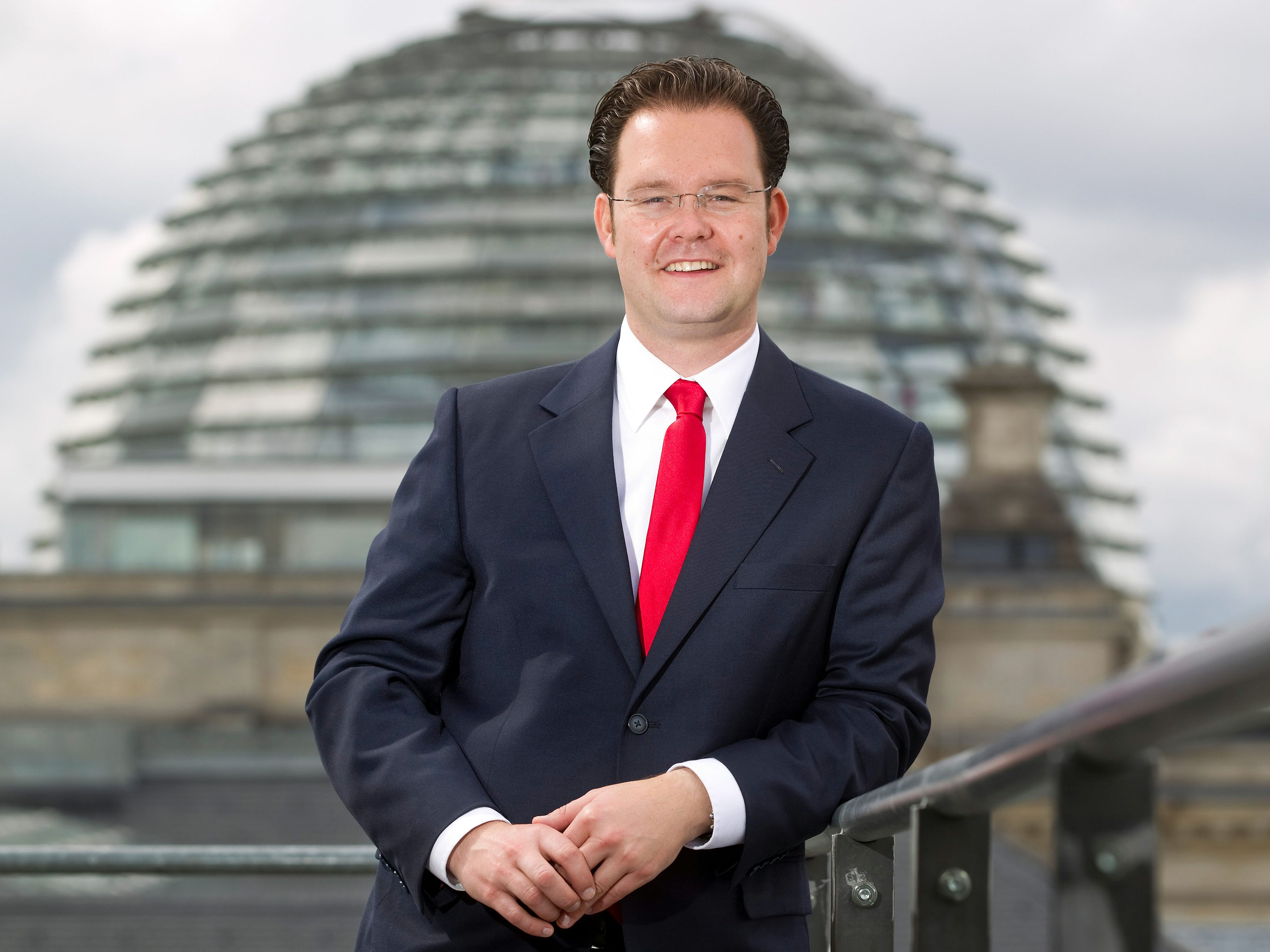 Tankred Schipanski, MdB, auf dem Dach des Reichstagsgebäudes